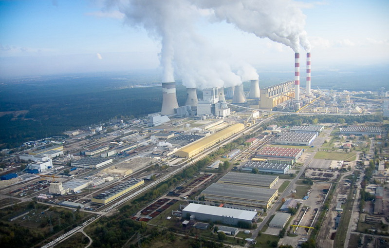 Widok z lotu ptaka